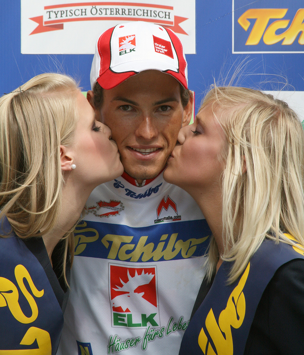 Österreich-Rundfahrt 2009: Stefan Denifl, der bestplatzierte Österreicher der Tour